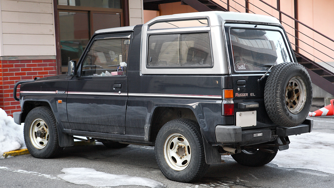 Daihatsu Rugger Resin-top 2.8 Turbo diesel EL ( F75V )